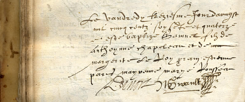 L'acte de baptême de Samuel de Champlain Se lit: « Le vendredy treziesme jour daoust mil cinq centz soyxante et quatorze a esté baptizé Samuel filz de Anthoynne Chapeleau et de Marguerite le Roy parain Estienne Paris et marainne Marye Rousseau » (selon Eric Thierry, historien à la Société historique de Québec)